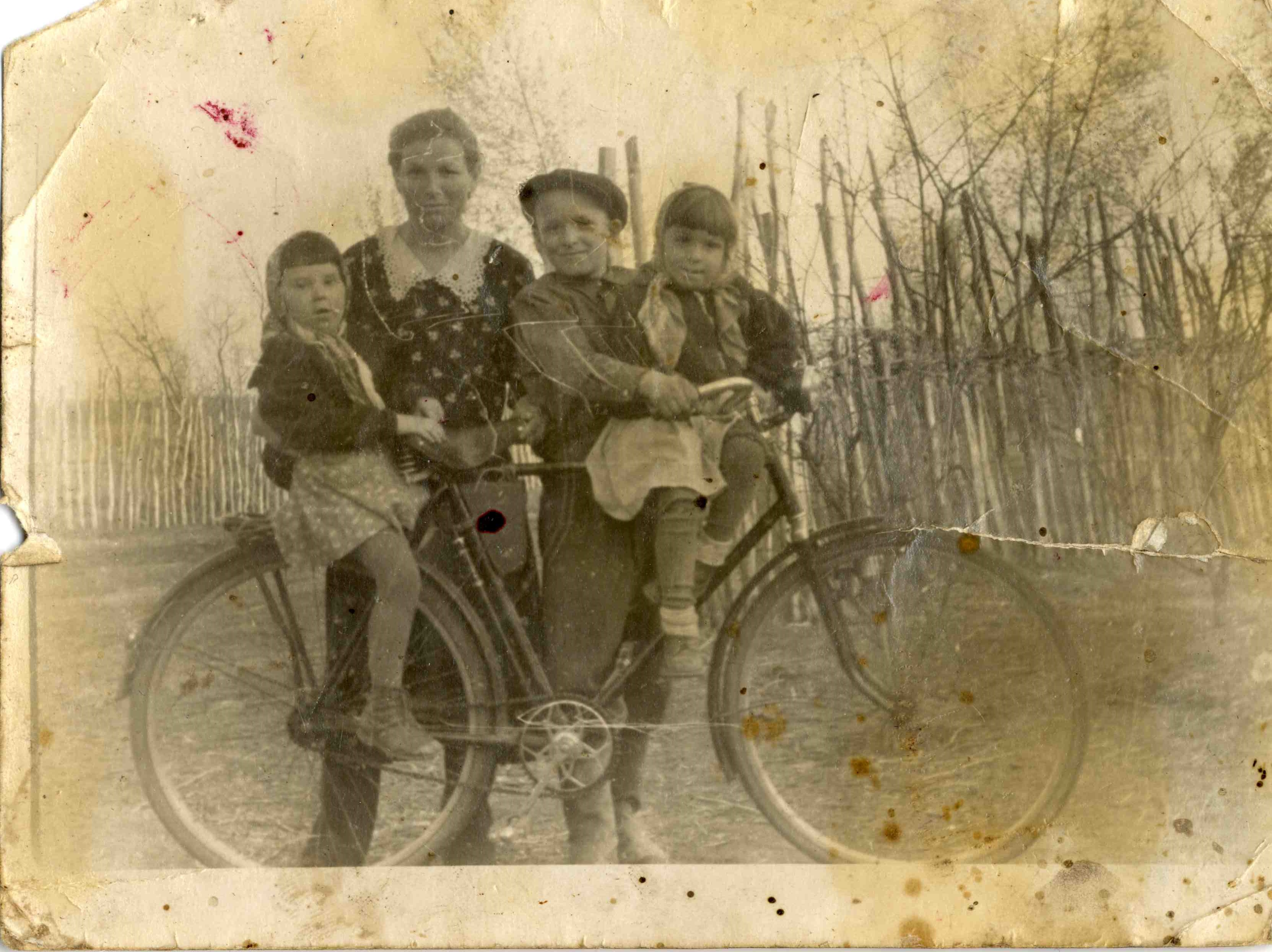 Жители села Крутицы фото 195Х г. На фото семья Беляковых.